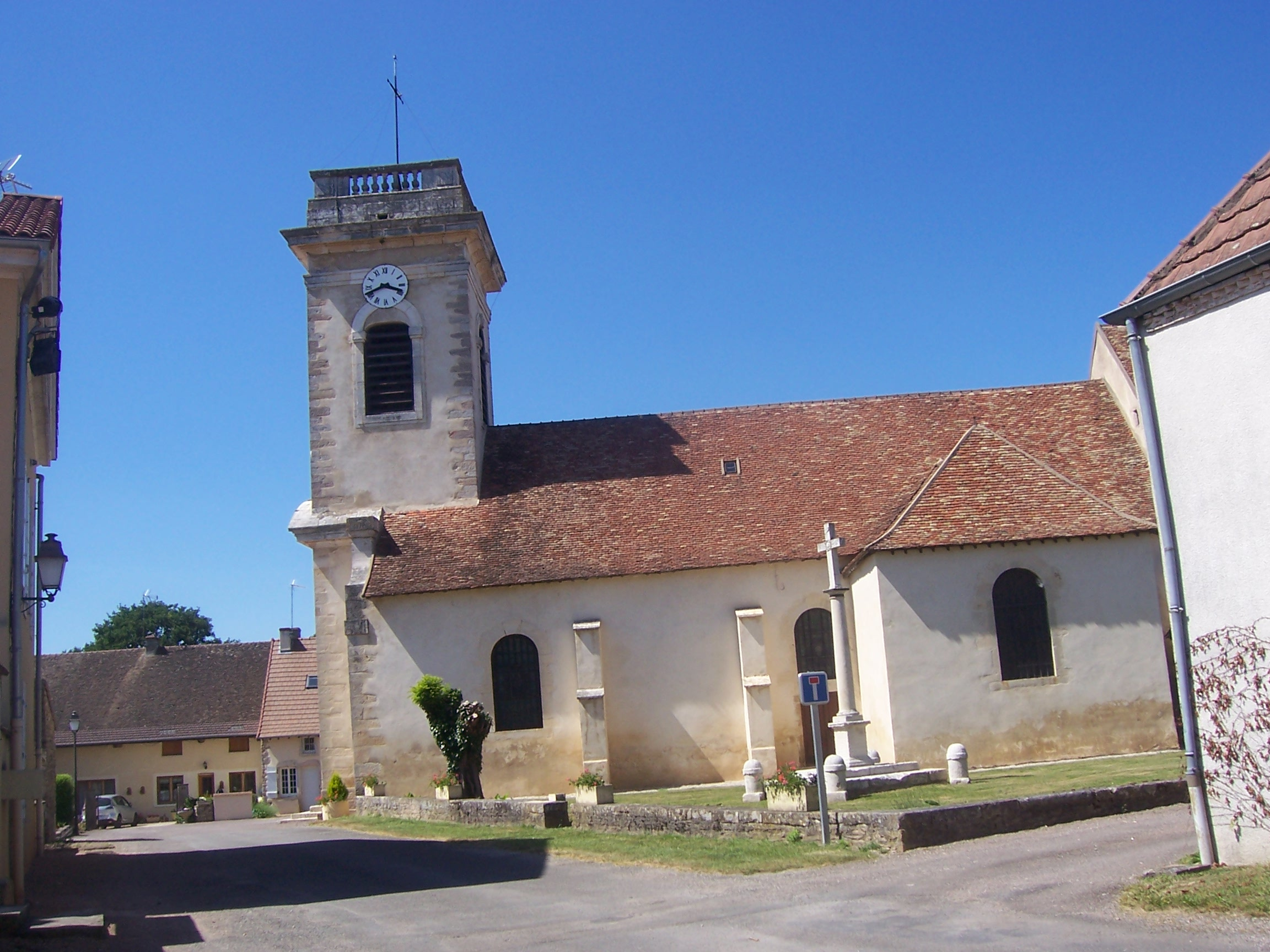 SaintCyrChurch.JPG